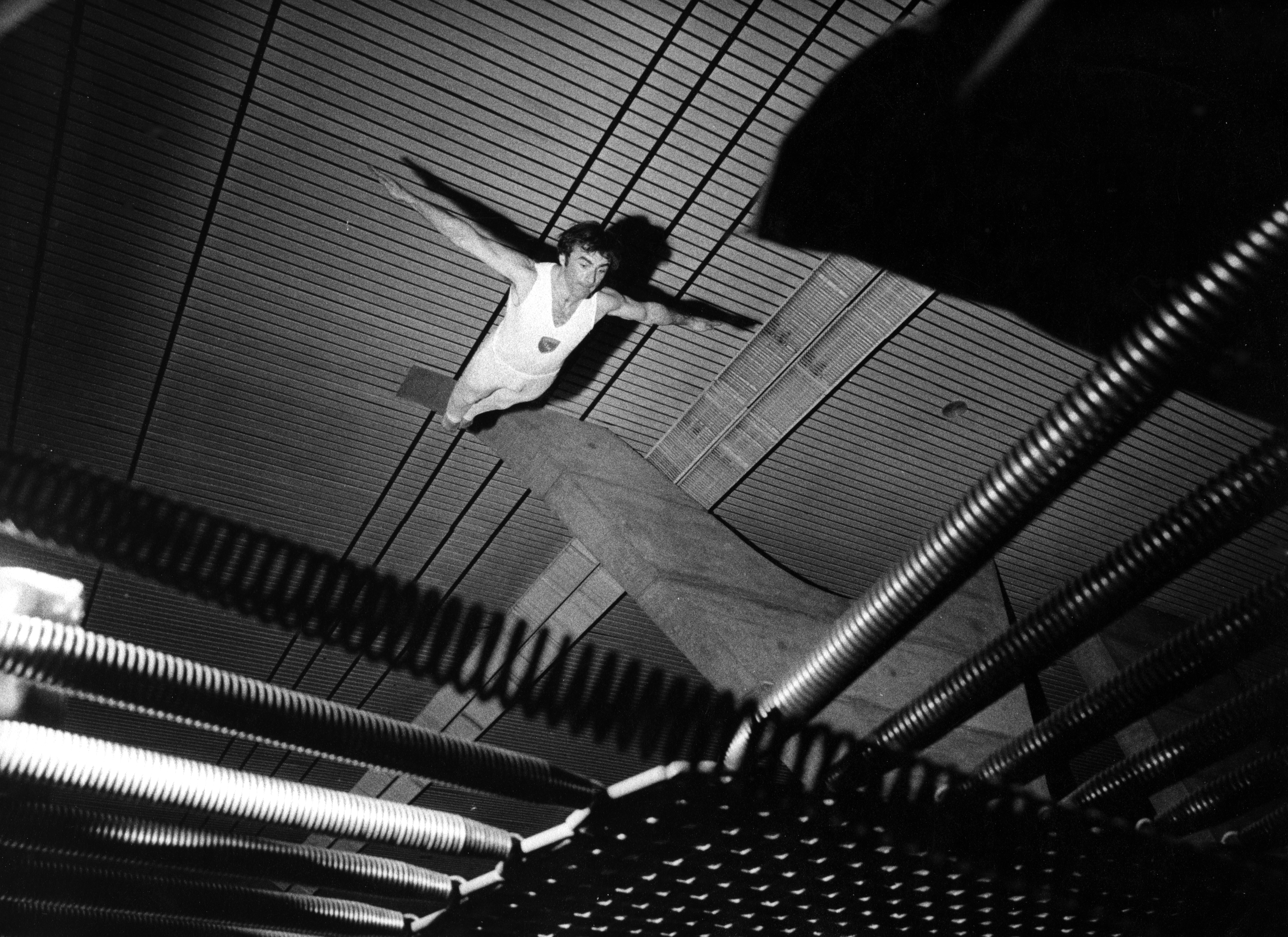 Paul Cheyrouze, premier champion de France de Trampoline de l'histoire. (1966 et 1968)